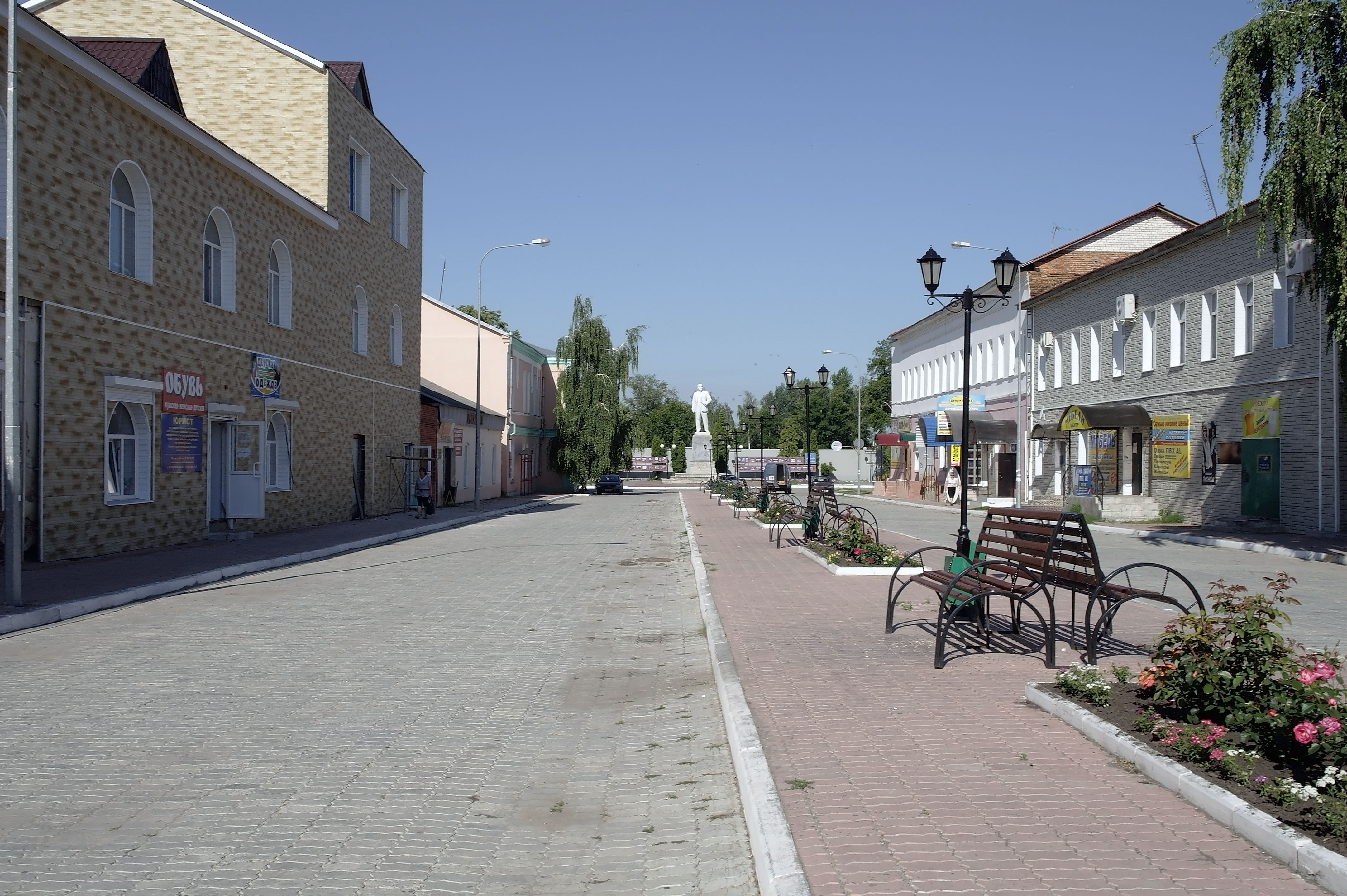 Скопин, ул. Ленина.